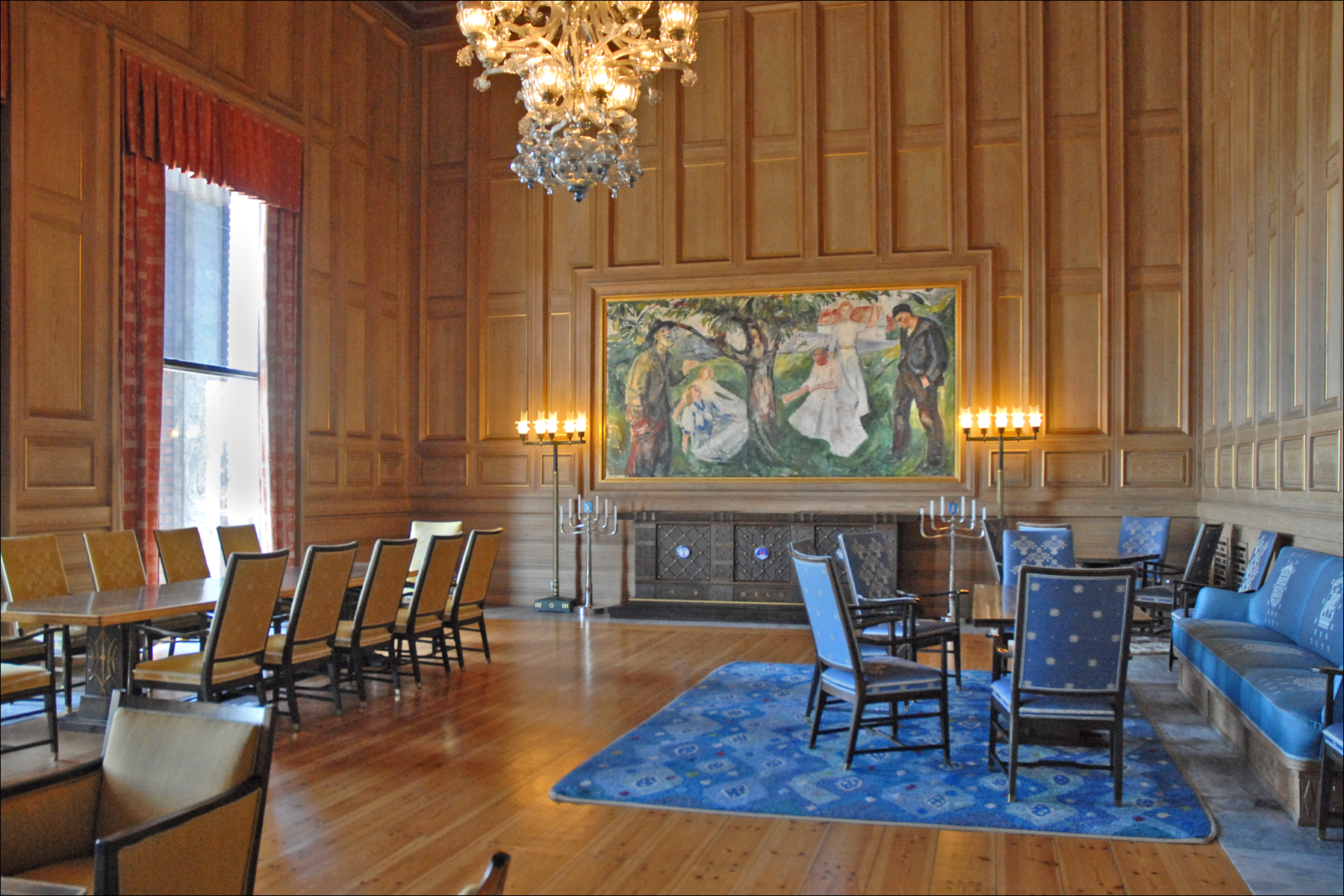 The Munch Room. Sur le mur du fond, une oeuvre d'Edvard Munch (1863-1944) peinte en 1910 intitulée "Life". Elle représente la jeunesse et la vieillesse autour de l'arbre de la Vie. Les couleurs du mobilier sont le blanc et le bleu, les deux couleurs de la Norvège. Les dessins, tapis et les tissus garnissant le mobilier ont été conçus par Else Poulsson, Kjellaug Hollas et Ulrikke Muller Falck-Jorgensen et fabriqués en Norvège. Les meubles ont été conçus par un des architectes de l'hôtel de ville : Arnstein Arneberg. L'hôtel de ville (Rådhuset) d'Oslo a été inauguré en 1950. Il a été décoré par des artistes norvégiens de la première moitié de 20e siècle, avec des motifs tirés de l'histoire, de la culture et du monde de travail norvégiens. Il a été conçu par les architectes Arnstein Arneberg et Magnus Poulsson, en 1931 dans un style art déco scandinave mais terminé après la guerre en 1950.